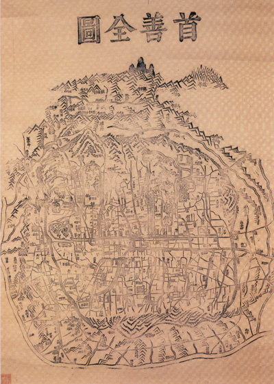 首善全图(首尔古地图)